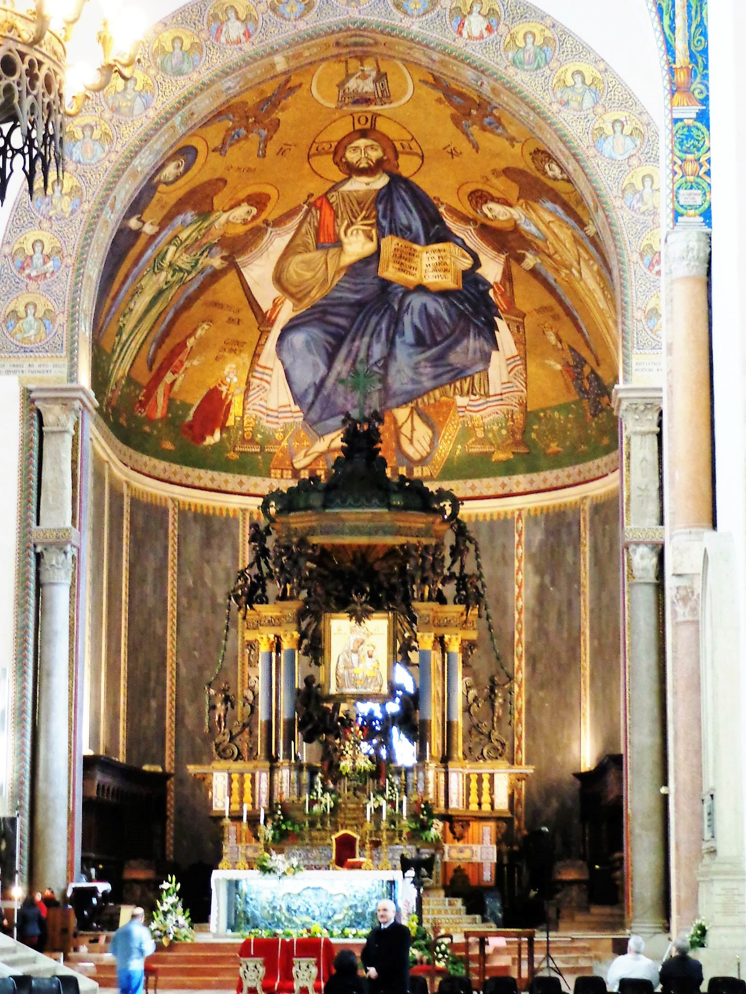 Abside duomo